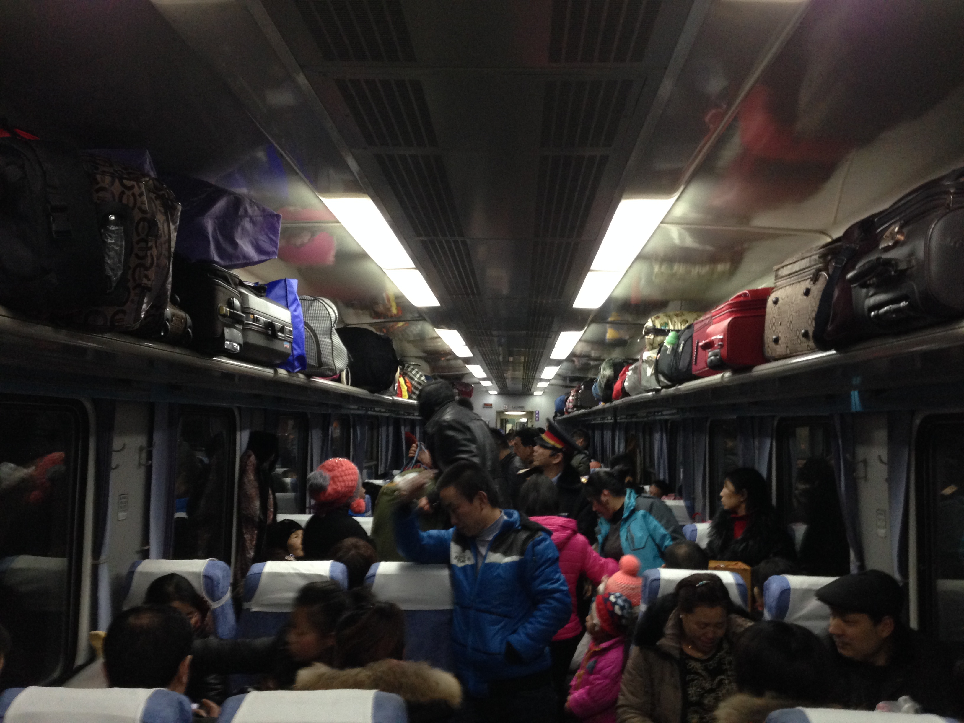 中文（中国大陆）: 中国春运是一场超乎想象的人类迁徙。图中的K680次列车硬座車廂景象，拍摄于一场并不典型的春运场景，但已经颇为拥挤。当时，这趟K680次列车正从石河子站开往乌鲁木齐站，终点站是西安站。